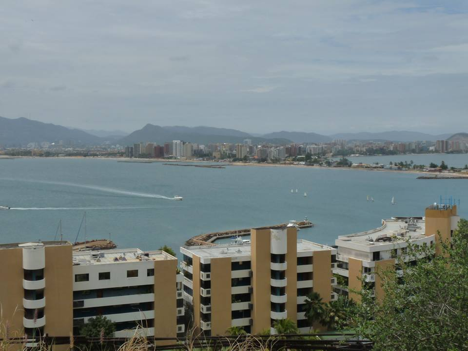 Lecherias estado Anzoategui